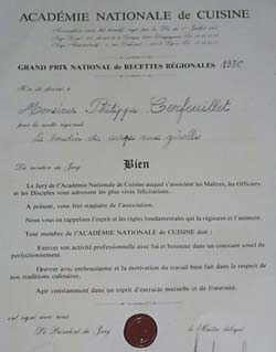 Academie nationale de cuisine/ Philippe Cerfeuillet